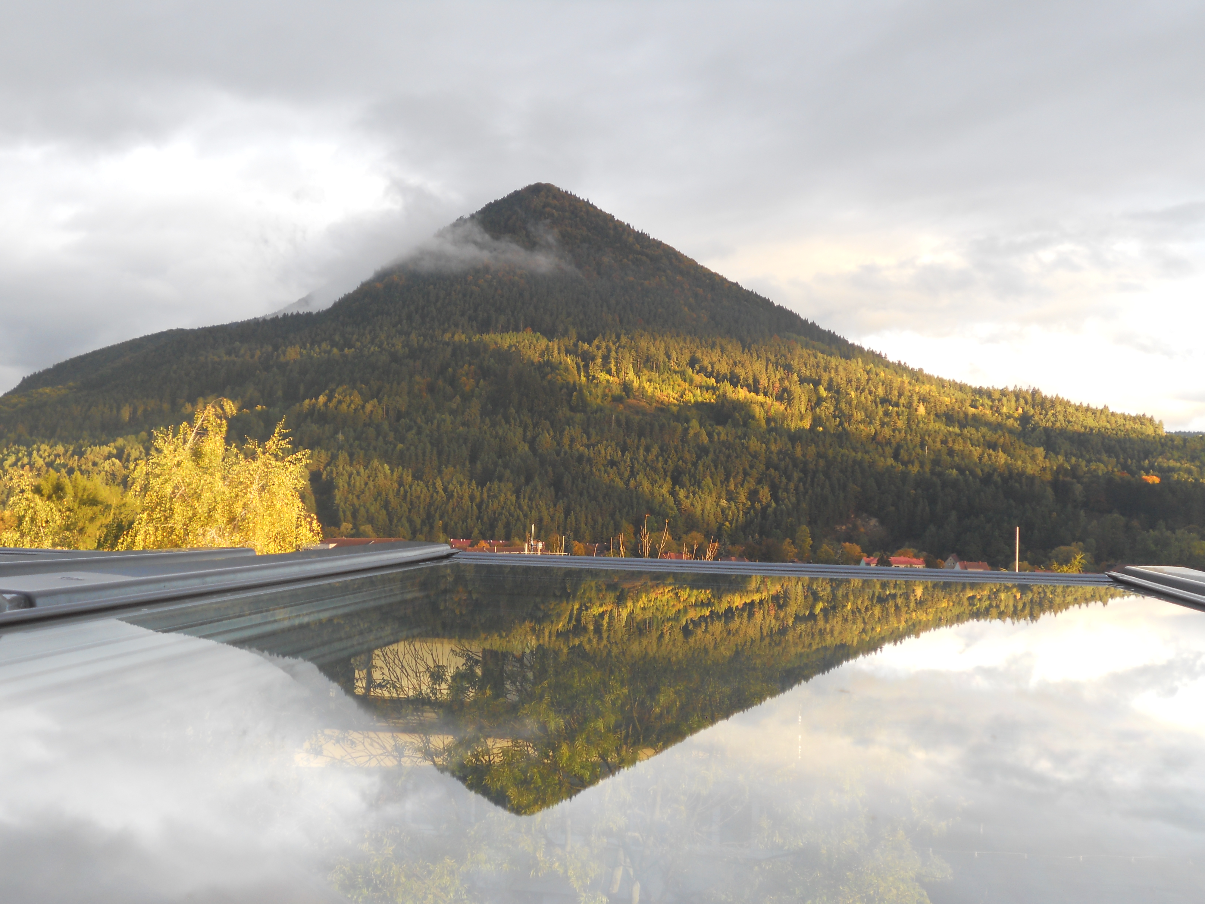 Čebrať v okne